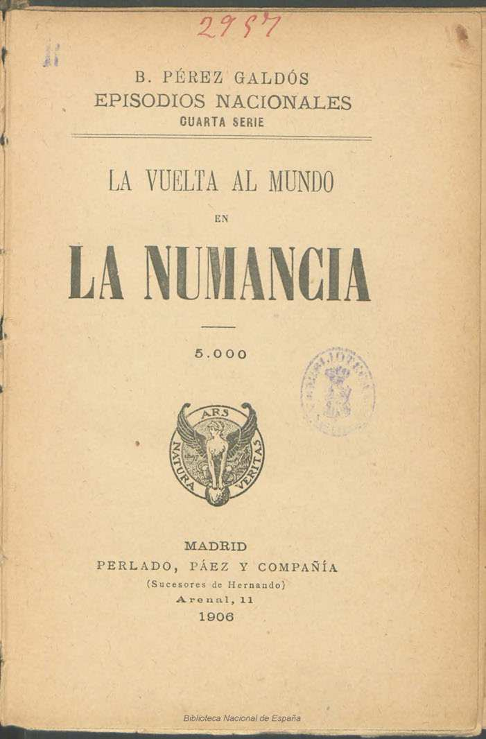 La vuelta al mundo en la Numancia ; B. Pérez Galdós Autor: Pérez Galdós, Benito (1843-1920) Fecha: 1906 Datos de edición: Madrid, Perlado, Páez y Compañía, Est. Tip. de la Viuda e Hijos de Tello